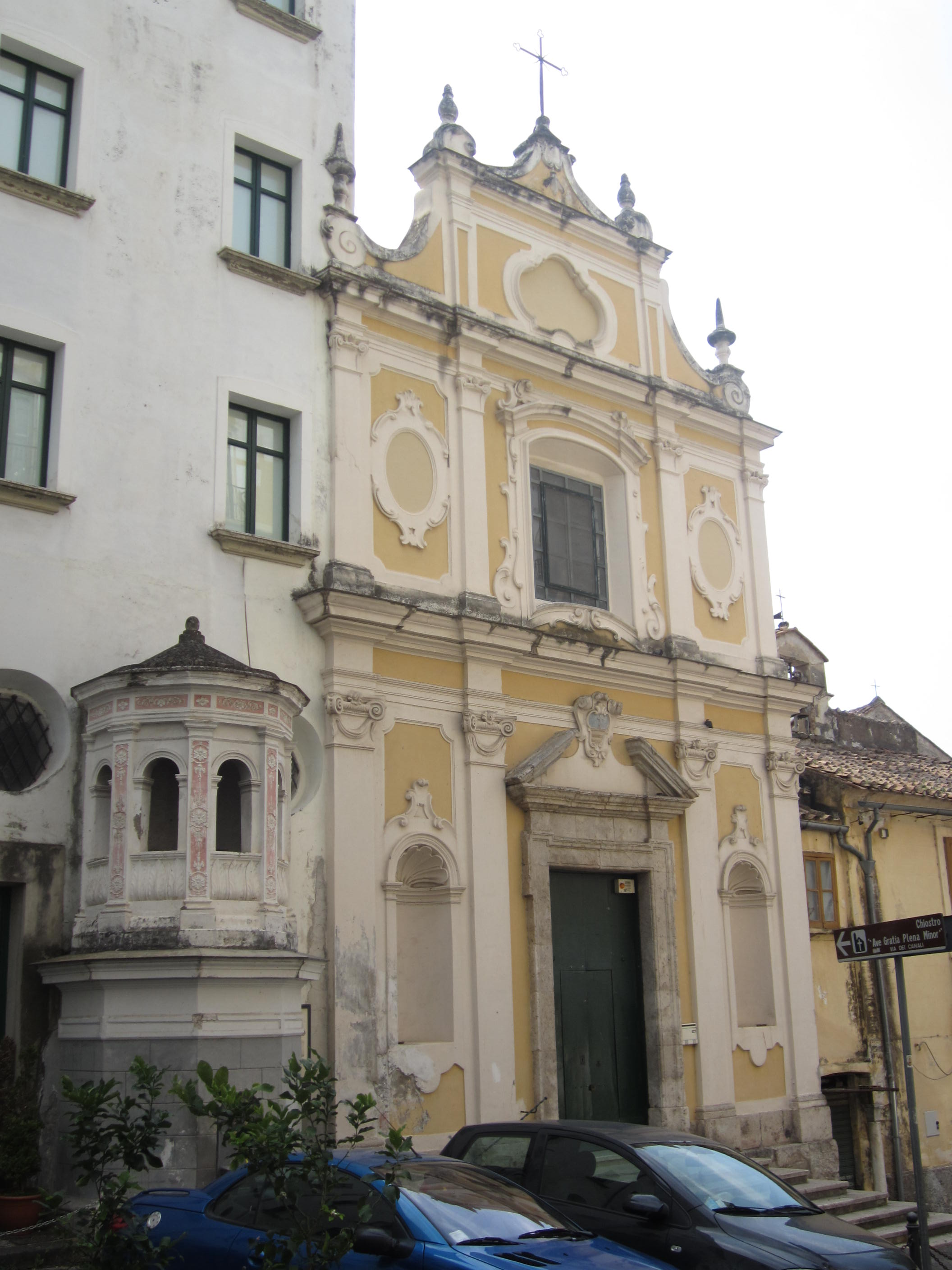 Chiesa dell' Annunziatella a Salerno